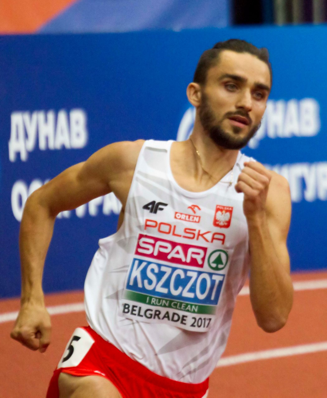 _113 800m series kszczot